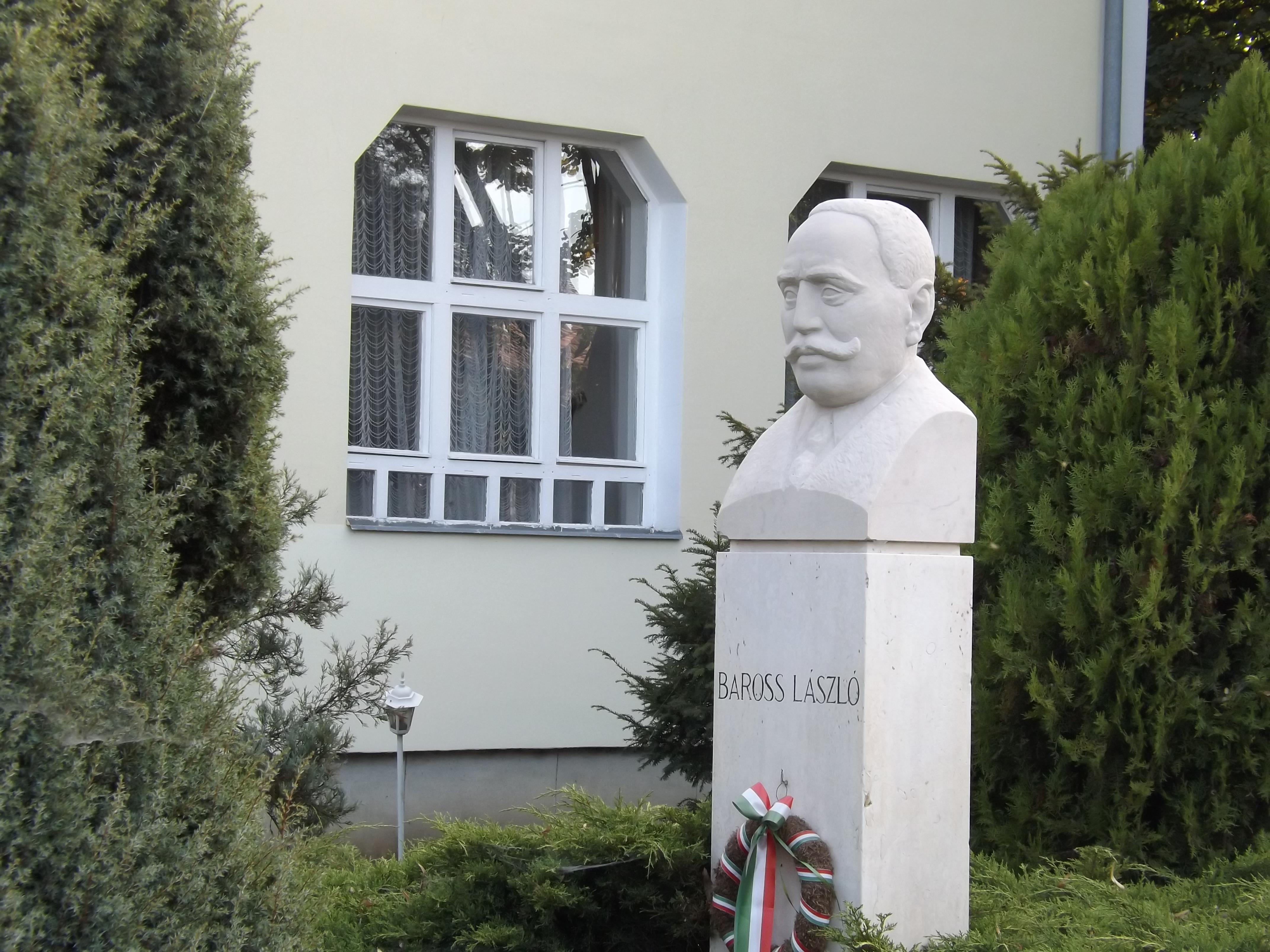 Mátészalka, Baross László mellszobra a Mezőgazdasági Szakközépiskola épülete előtt